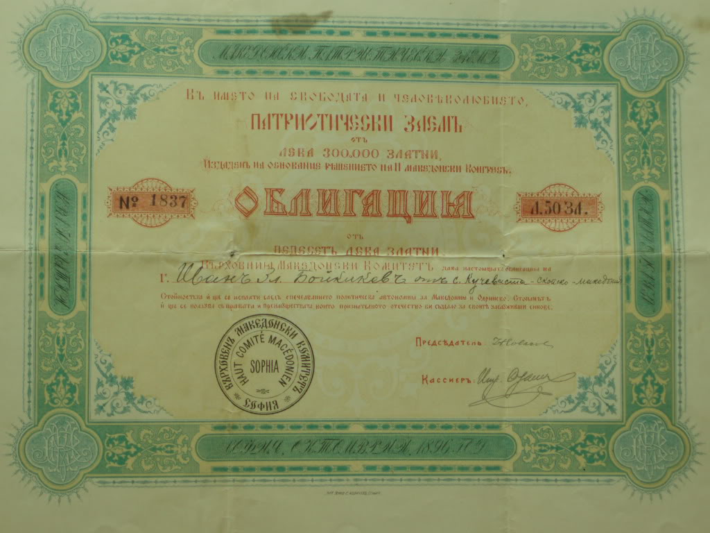 Облигация на ВМОК на името на Иван Златанов Бойкикев. Изплатена на 2 април 1903 година. Подписана от Йосиф Ковачев.